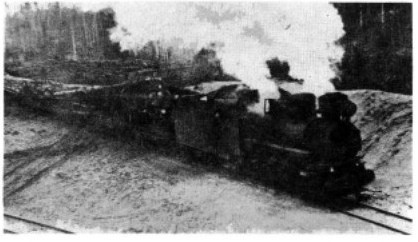 поезд